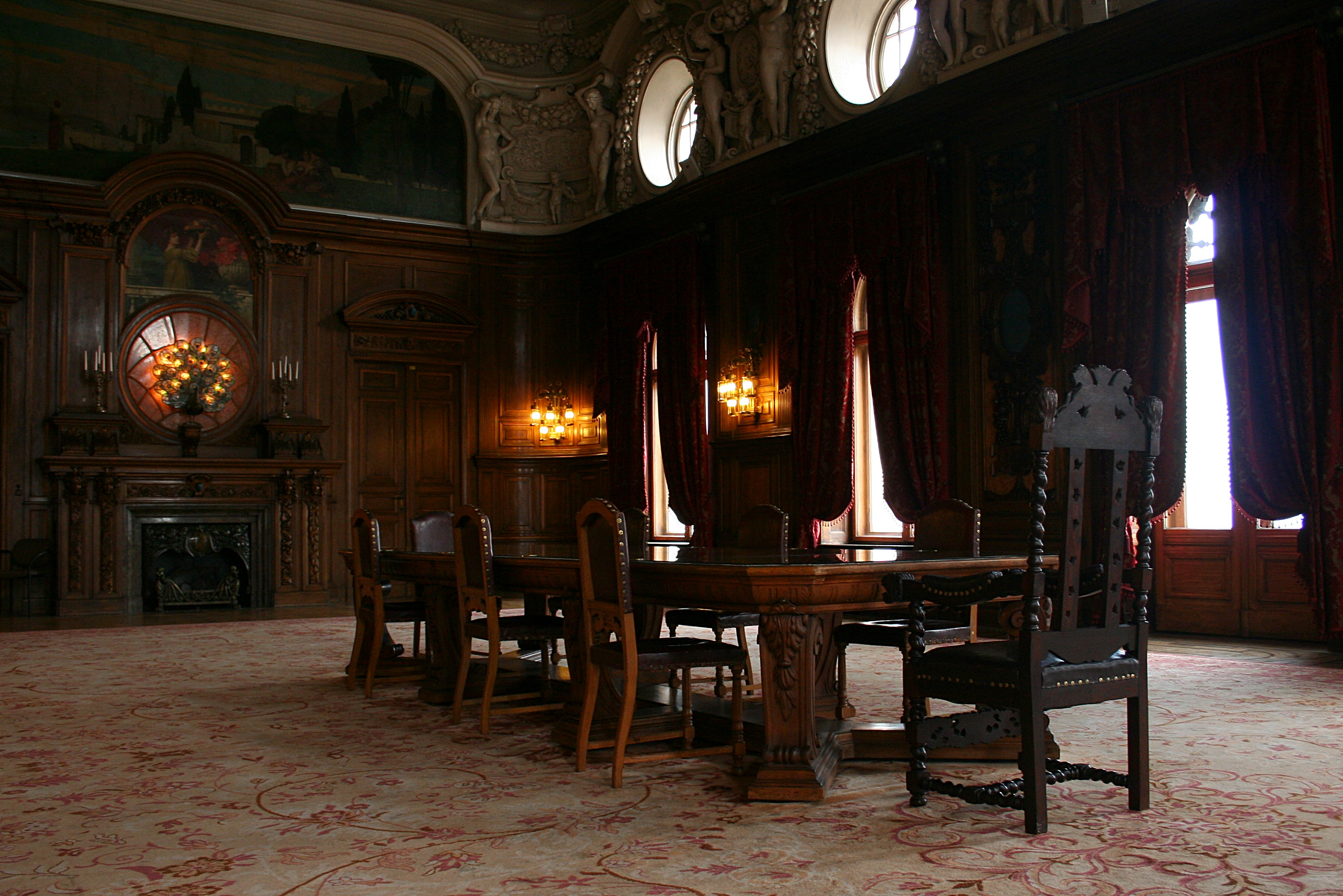 Fotowarsztaty w Łodzi. Sala reprezentacyjna w pałacu Izraela Poznańskiego.